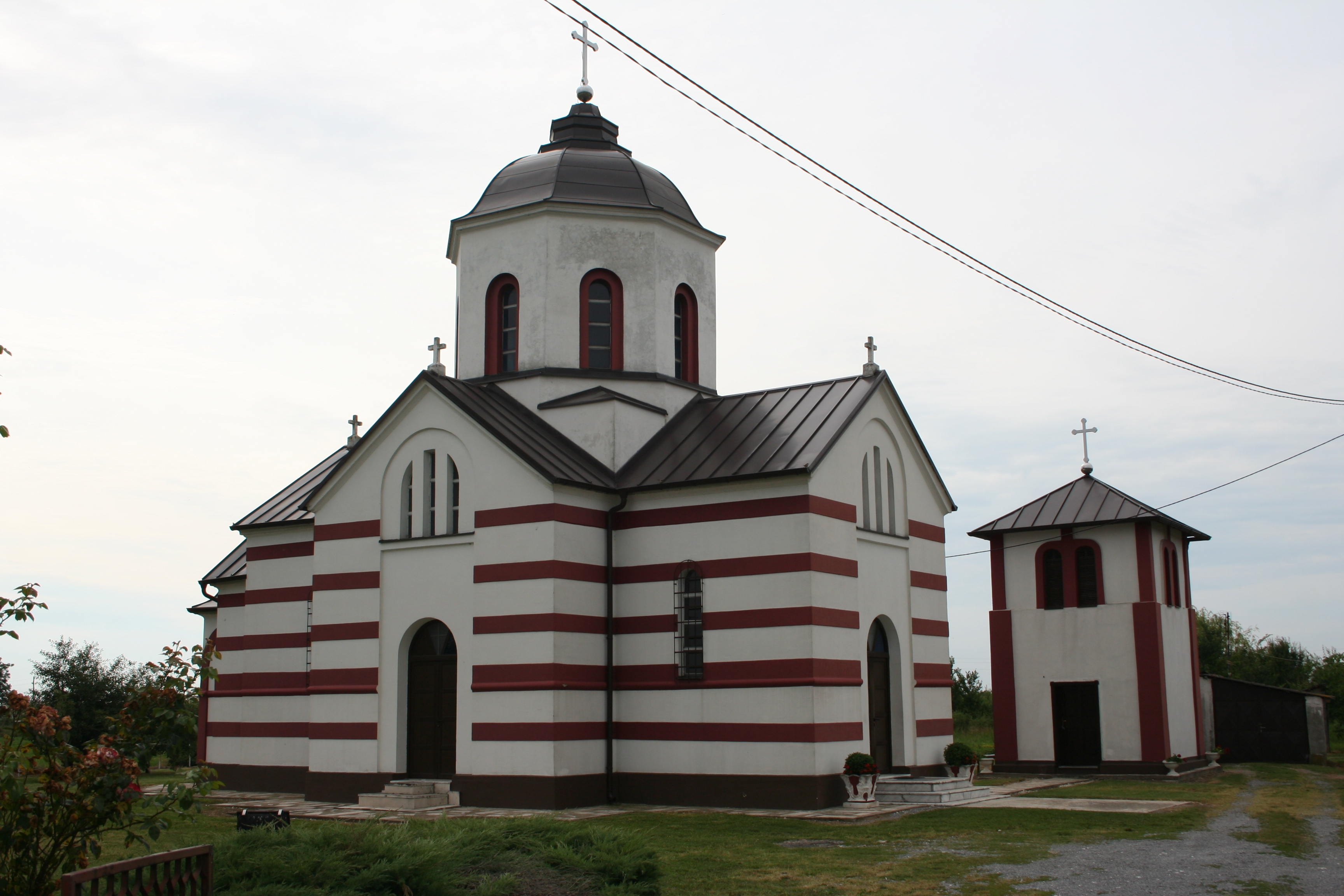 Debrc, opština Vladimirci - crkva Sv. Konstantina i Jelene